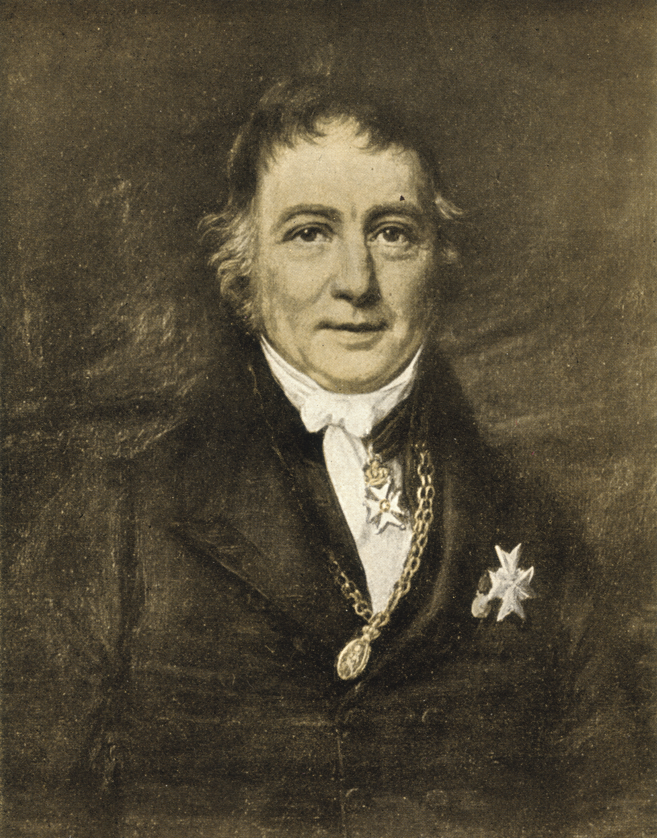 Wilhelm Frimann Koren Christie (1778–1849). Portrettet som var brukt på norske pengesedler 1901–45.